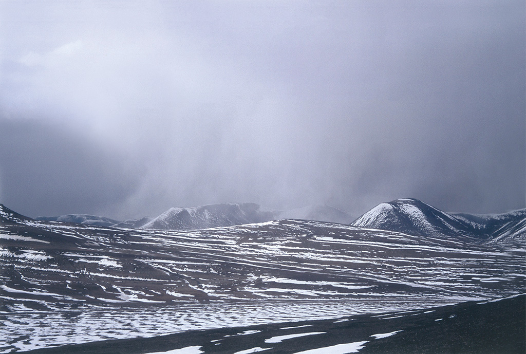 양후로 가기위해 탐험대는 장서깡르 산맥을 따라 북상하기로 했다